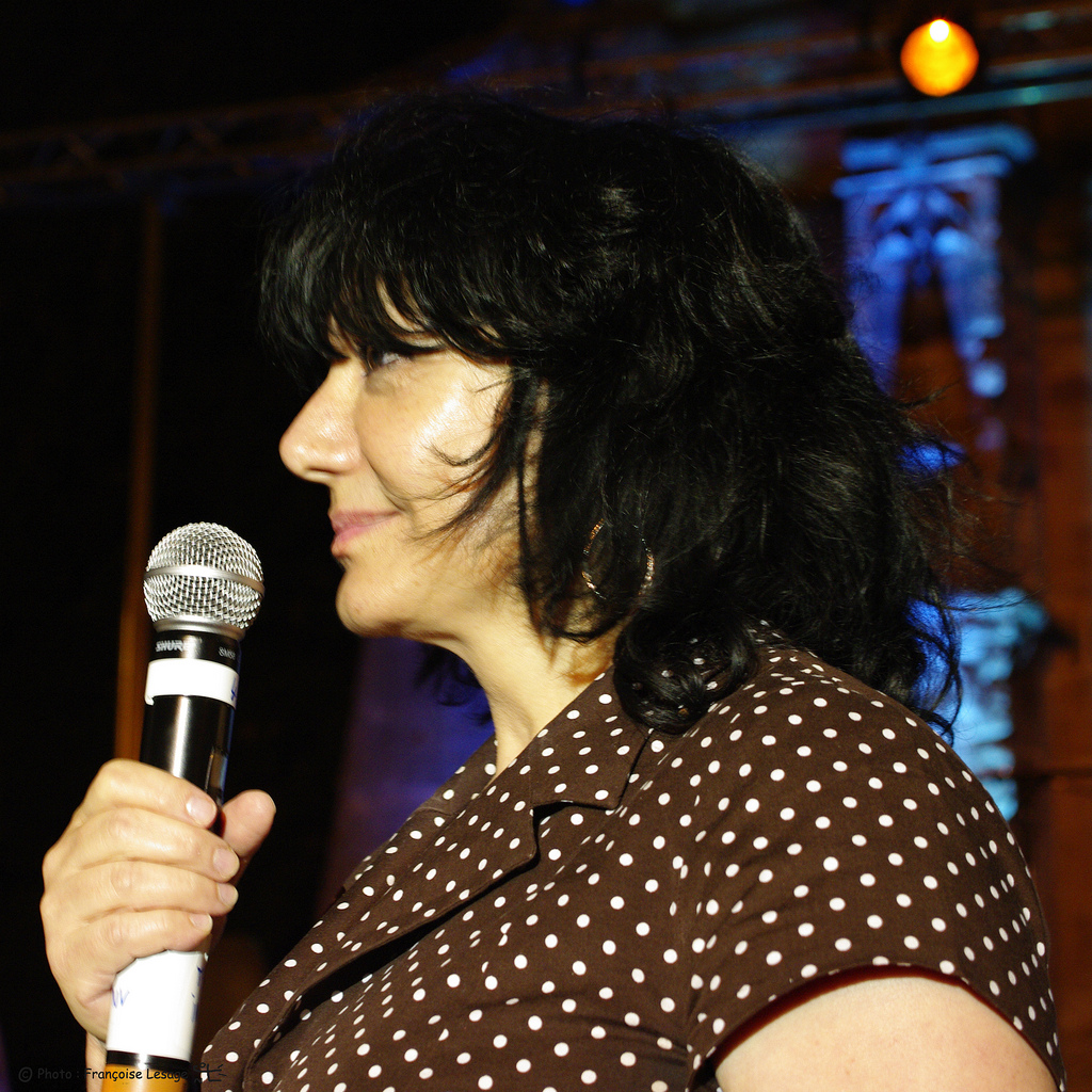 Salwa Al Neimi